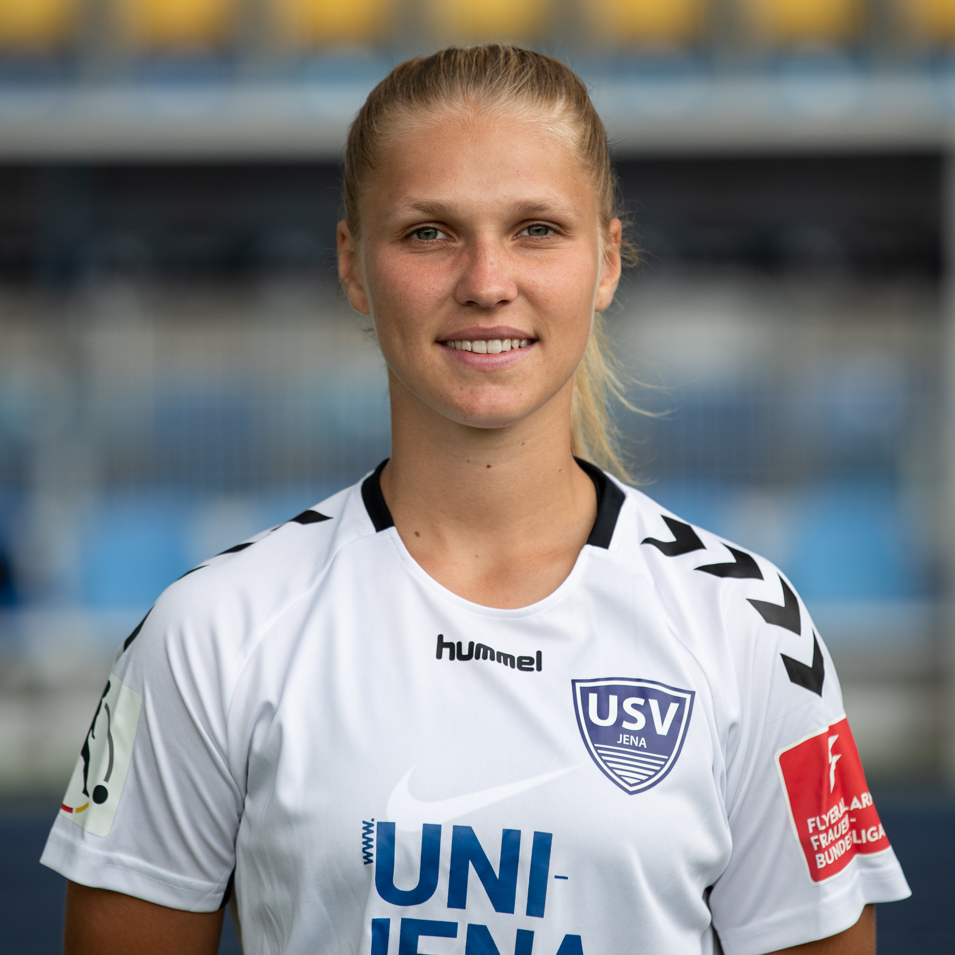 Fußball, Flyeralarm Frauen-Bundesliga, Mannschaftsfotos FF USV Jena; Any Adam (FF USV Jena, 22); Porträt, Einzelbild